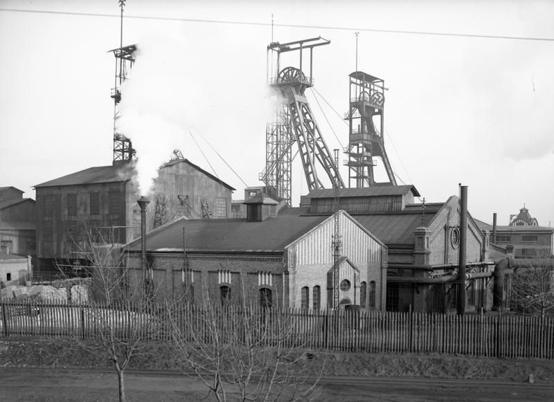 Richterschächte in Laurahütte, Fördertürme und Werkhallen